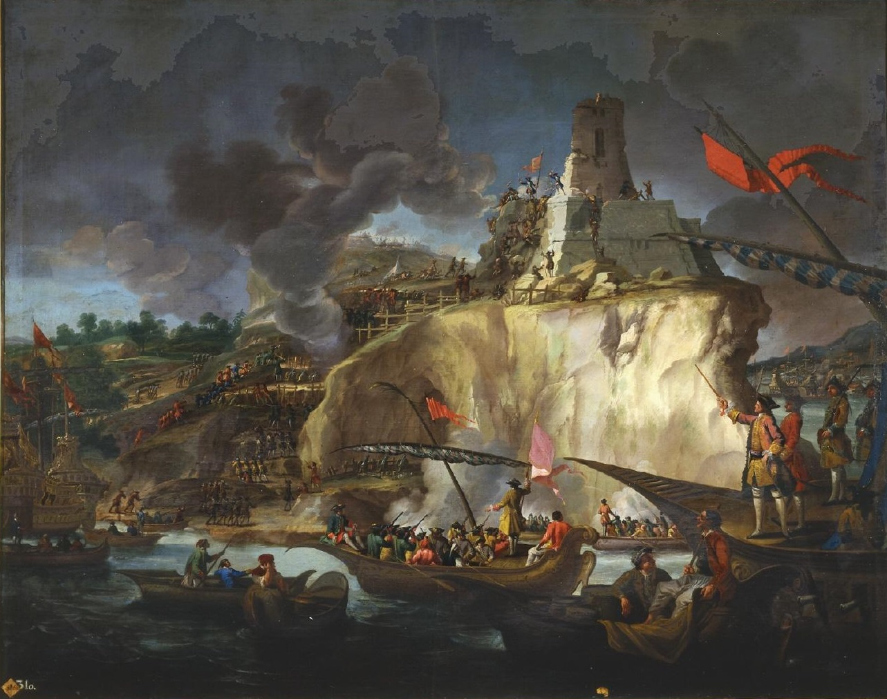 La obra representa la defensa por las tropas españolas del Castillo de los Tres Reyes Magos del Morro en 1762.